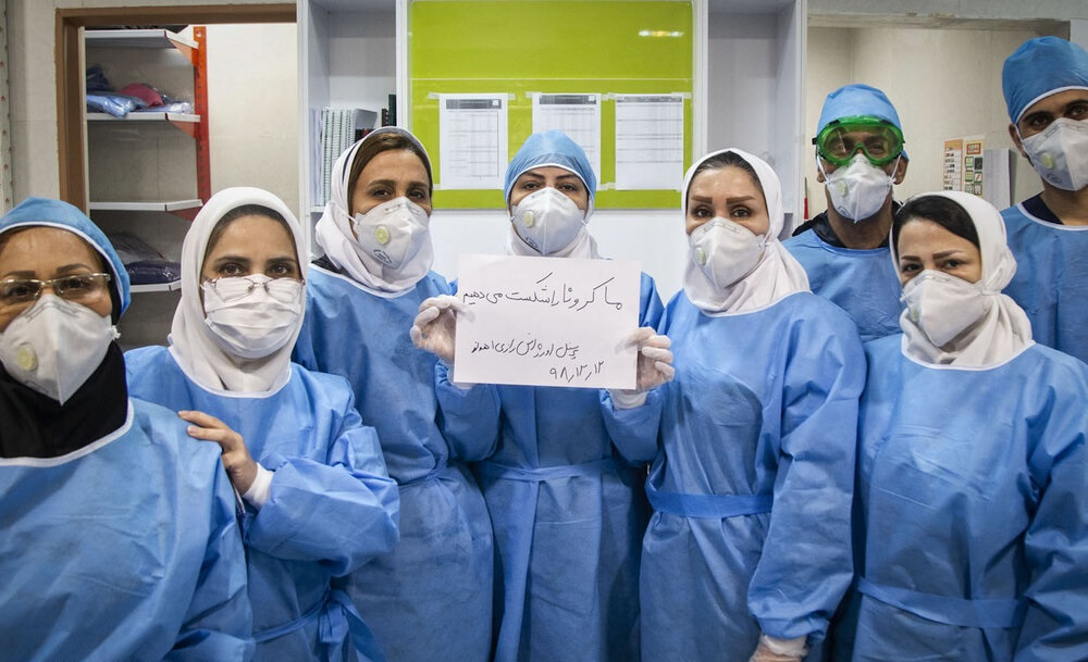 جهادگران خط مقدم مبارزه با کرونا در اهواز